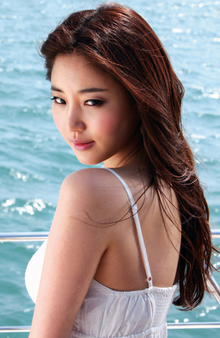 LG전자 옵티머스 블랙 광고 촬영 사진 모음- 김사랑 & 유아인